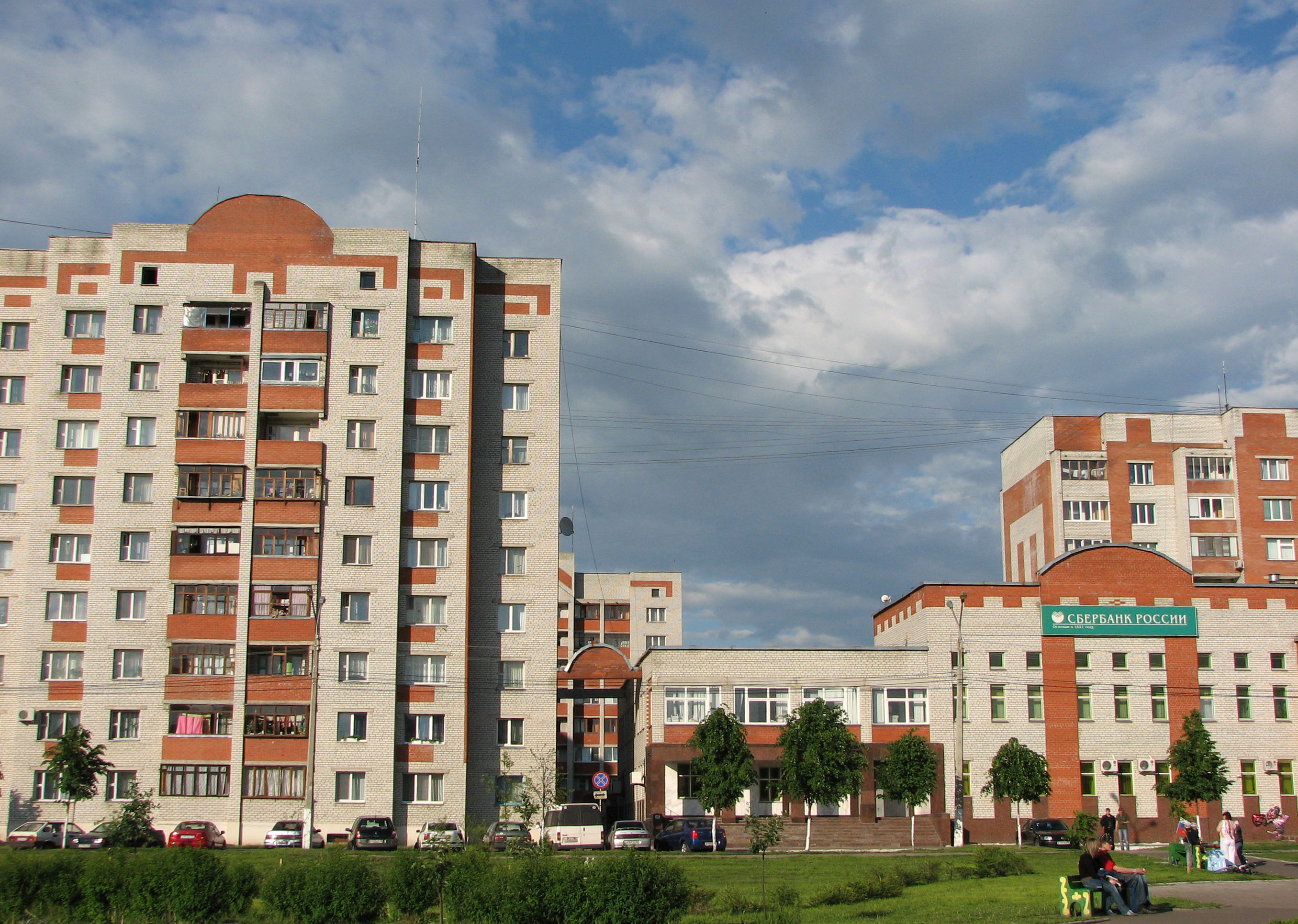 Железногорск.Курская область.